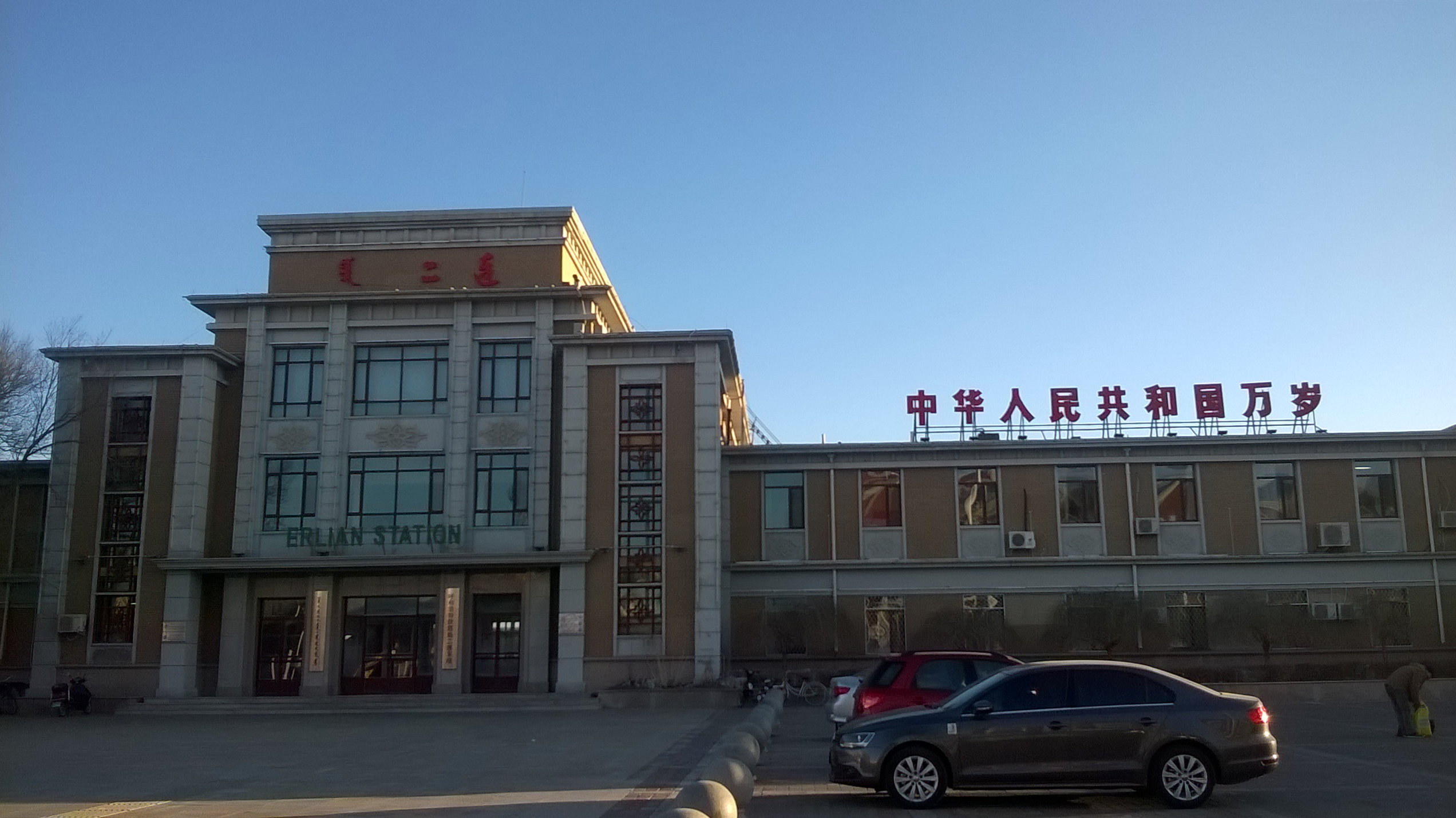 二连火车站。